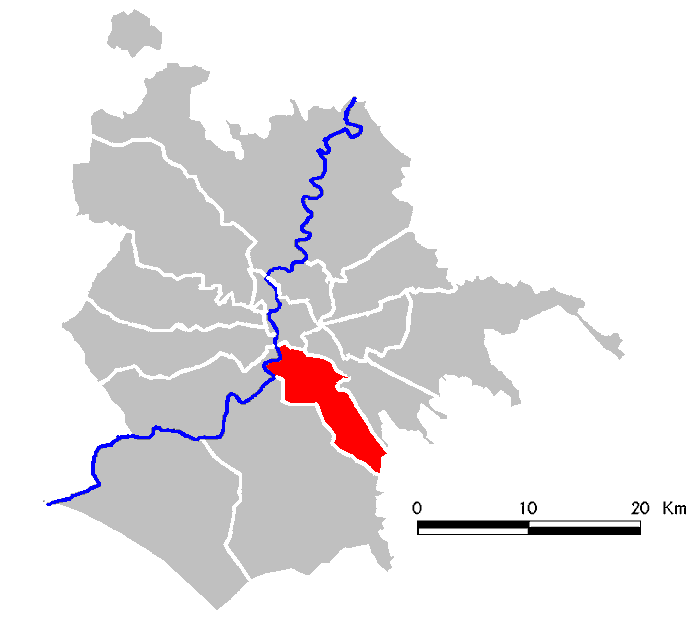 Municipio Roma VIII